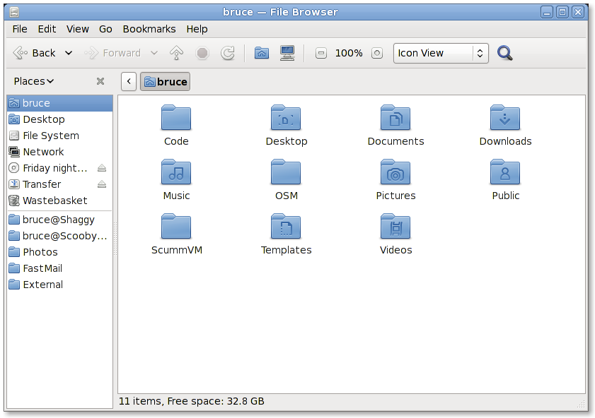 Nautilus 2.30